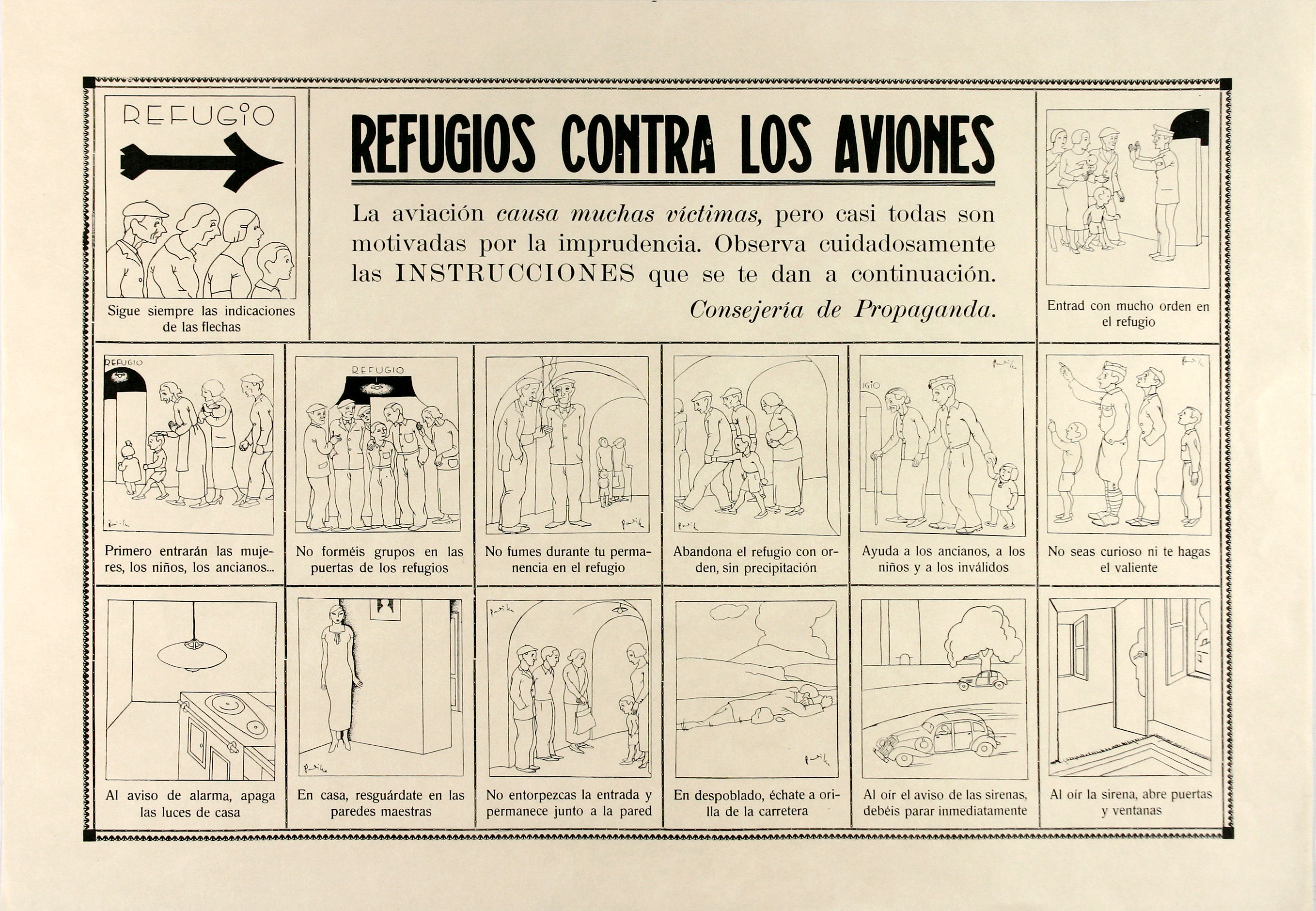 Indicacions o normes a seguir en els refugis antiaeris en cas de bombardeig durant la Guerra Civil espanyola.